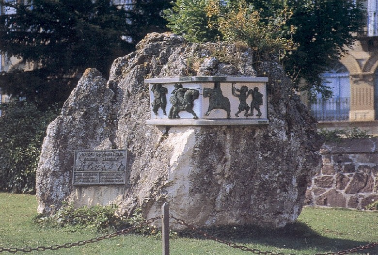 Date du cliché : septembre 2001.